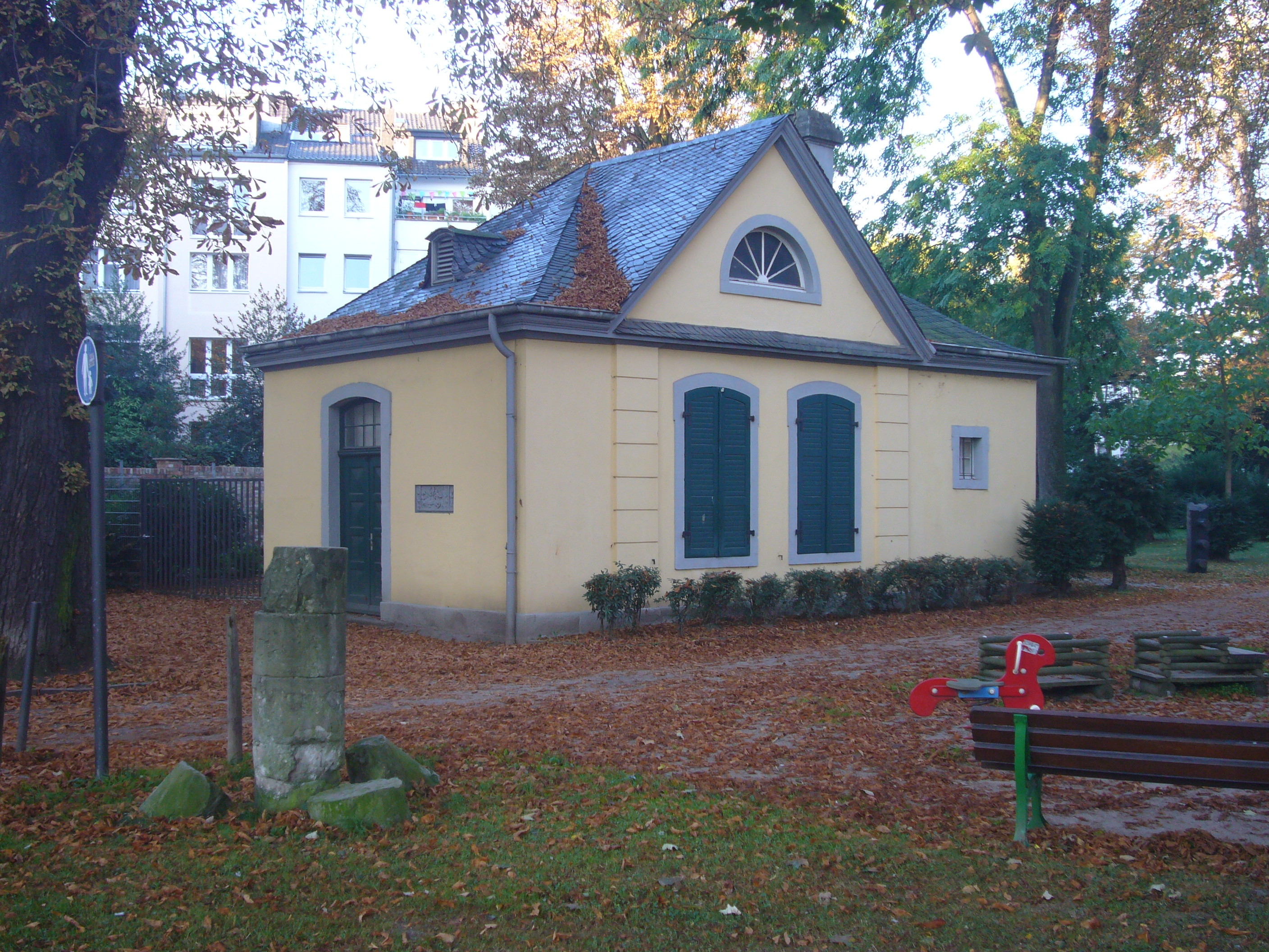 Das Kurfürstliche Gärtnerhaus in der Bonner Weststadt